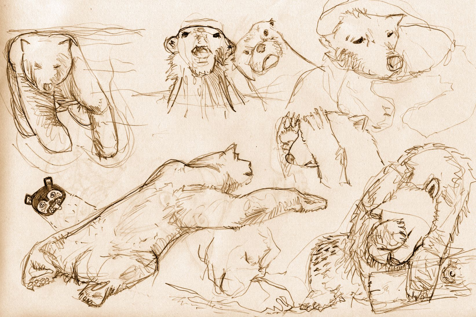 polar bear sketchs